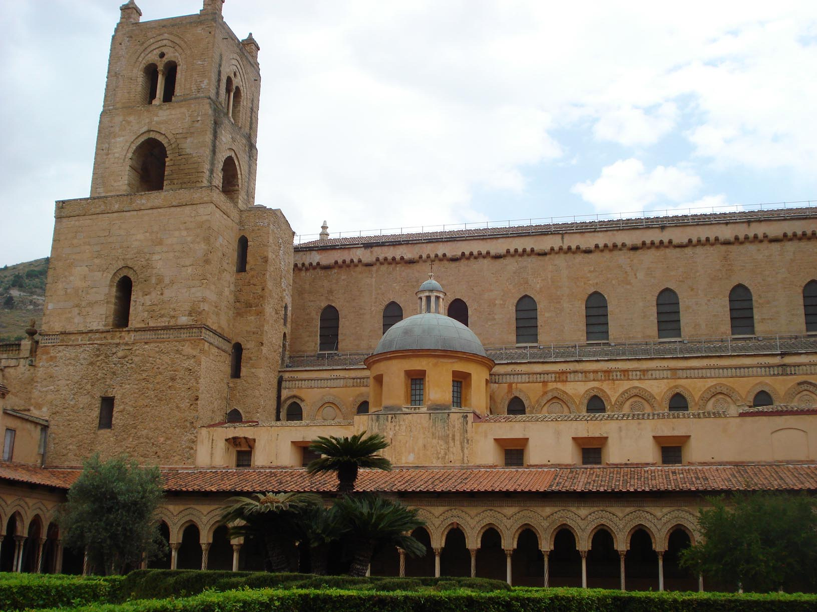 Cattedrale di Monreale. Собор_в_Монреале-вид_из_клуатра